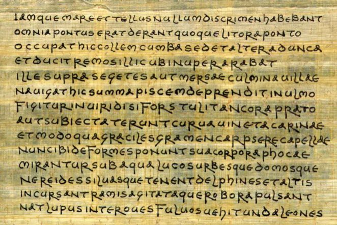 Ovidius - metamorfózis. Az ukrán wikiből.